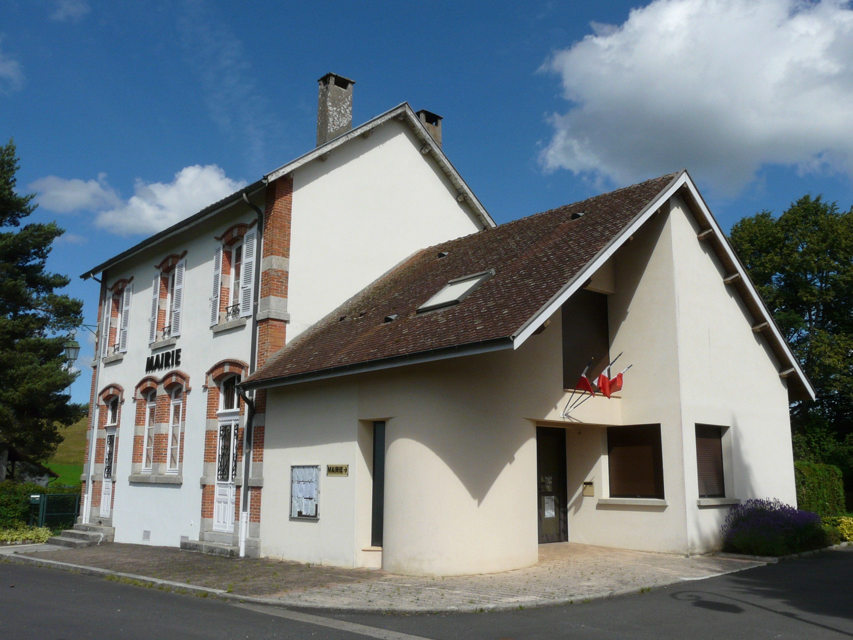 La mairie de Saint-Étienne-Cantalès, Cantal, France.